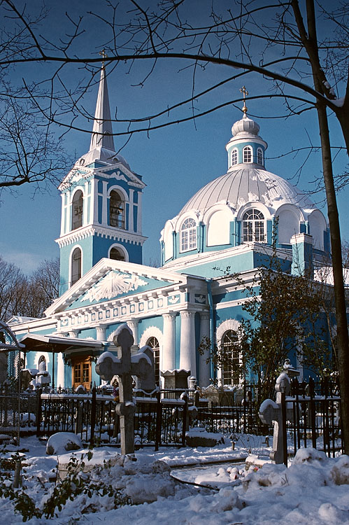 Церковь Смоленской иконы Божией Матери на Смоленском кладбище, Санкт-Петербург